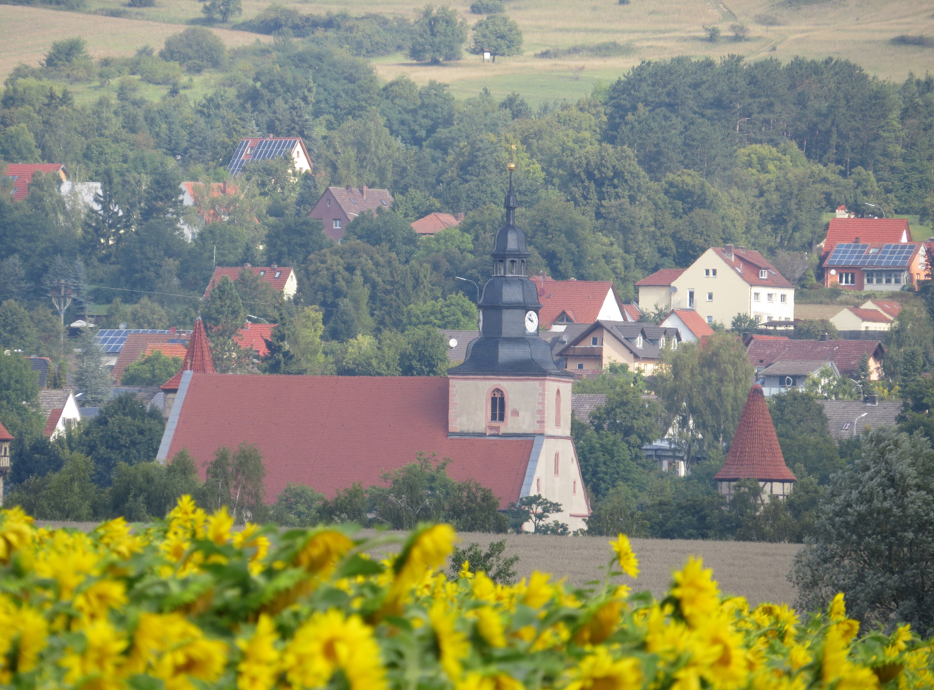 Ostheim vor der Rhön von Süden